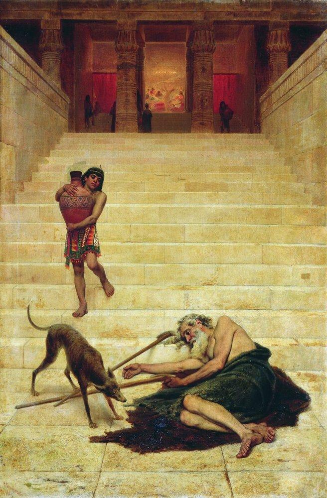 Притча о Лазаре. 1886